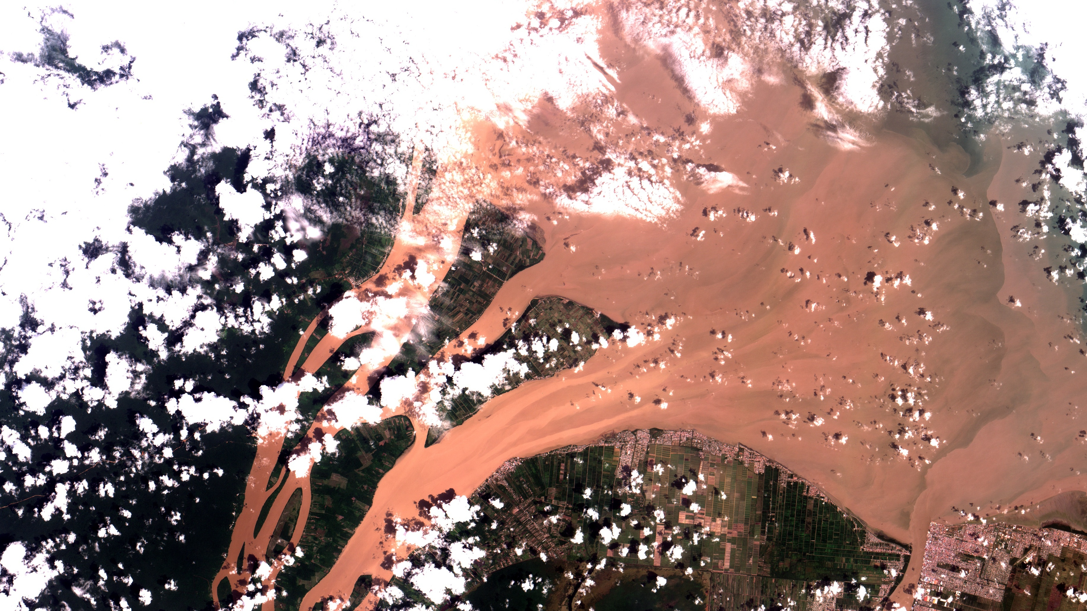 Dois braços do delta do Rio Essequibo na Guiana em sua foz no Oceano Atlântico. Poucos quilômetros à Oeste de Georgetown, a região continental na parte de baixo da imagem é conhecida como Costa do Essequibo. Área urbana em salpicado claro alaranjado. Agricultura, principalmente arroz inundado, nos lotes quadriculados, de preto, quando inundado a verde escuro a claro e marrom quando com cobertura vegetal ou seco. No alto à esquerda as Ilhas Leguan e Wakenaan, onde se vê remanescentes de mangues em verde escuro. Nuvens em branco e suas sombras em preto / Two Guiana´s Essequibo River channels at its mouth in the Atlantic. A few miles West of Georgetown, continental area at image bottom is known as Essequibo Coast. Urban areas appear in orangeish saltpepper. Agriculture, mostly flooded rice, occurs at checkered pattern plots, from black when with water to light to dark green when with vegetation, and brown when empty. At image left top are Leguan and Wakenaan Islands, whre there are some mangroove remanescents in dark green. Clouds in white and its shadows in black. costadoessequibo #essequibocoast #guiana #rioessequibo #essequiboriver #parika #tuschen #leguaan #wakenaan #georgetown #delta #essequibodelta sensoriamentoremoto #remotesensing #cbers4 #cbers #inpe #geotecnologias Imagem / Image CBERS4 MUX Foz do Rio Essequibo na Guiana / Essequibo River Mouth, Guiana Coordenadas do centro da imagem / Image center: 6°54'30.0"N 58°21'13.7"W Data / Date: 21-02-2020 / 2020-21-02 RGB 765 (cor verdadeira / true color) Cena / Scene: 174 / 092 Autor / Author: Oton Barros (DSR/OBT/INPE) Imagem em HD / HD Image Visite-nos em